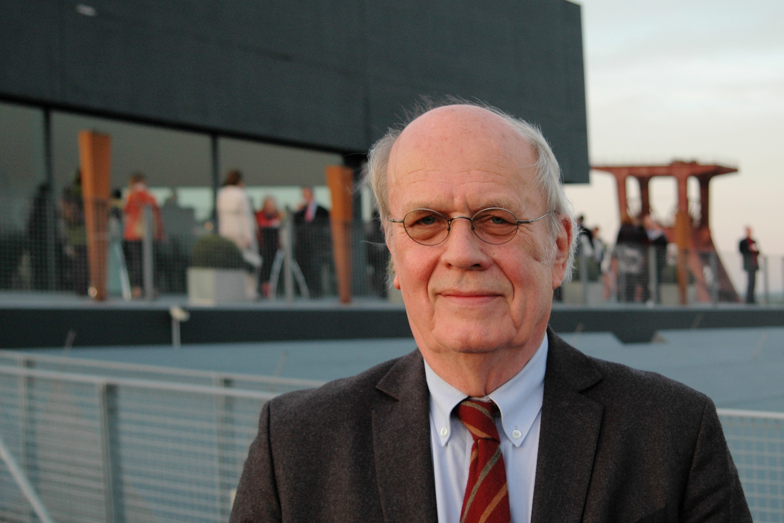 „Kunst & Kohle“